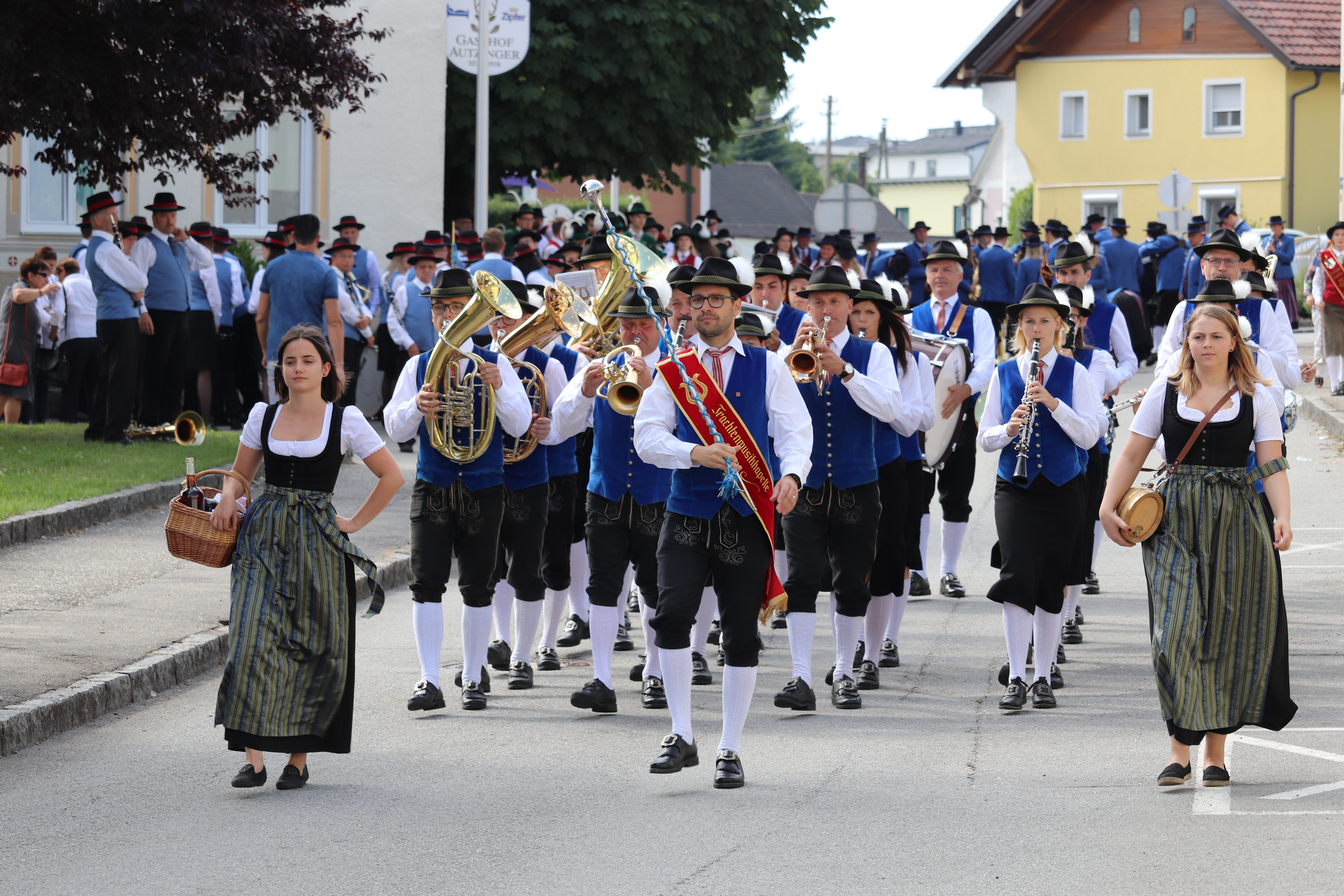 Trachtenmusikkapelle Weng beim Bezirksmusikfest des Blasmusikverbandes Schärding am 8. Juli 2018 in Riedau